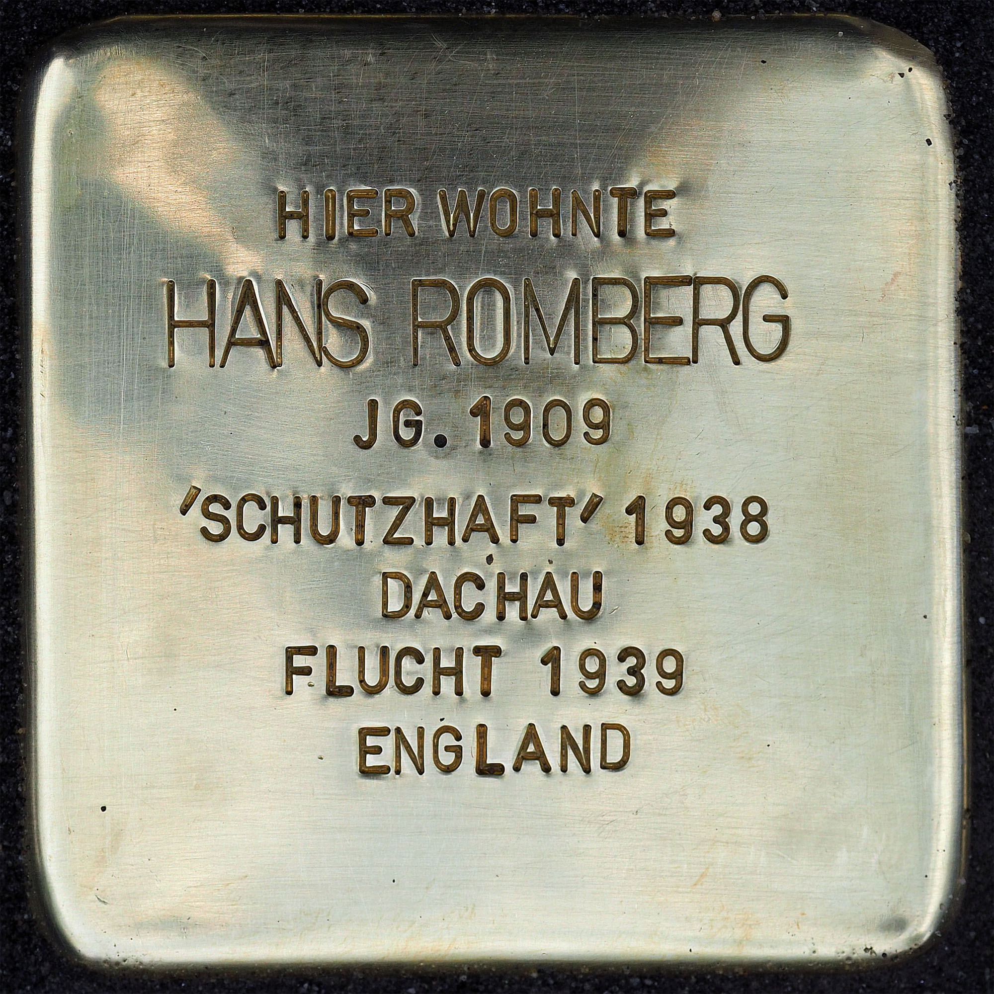 Stolpersteine in Tönisvorst: Hans Romberg